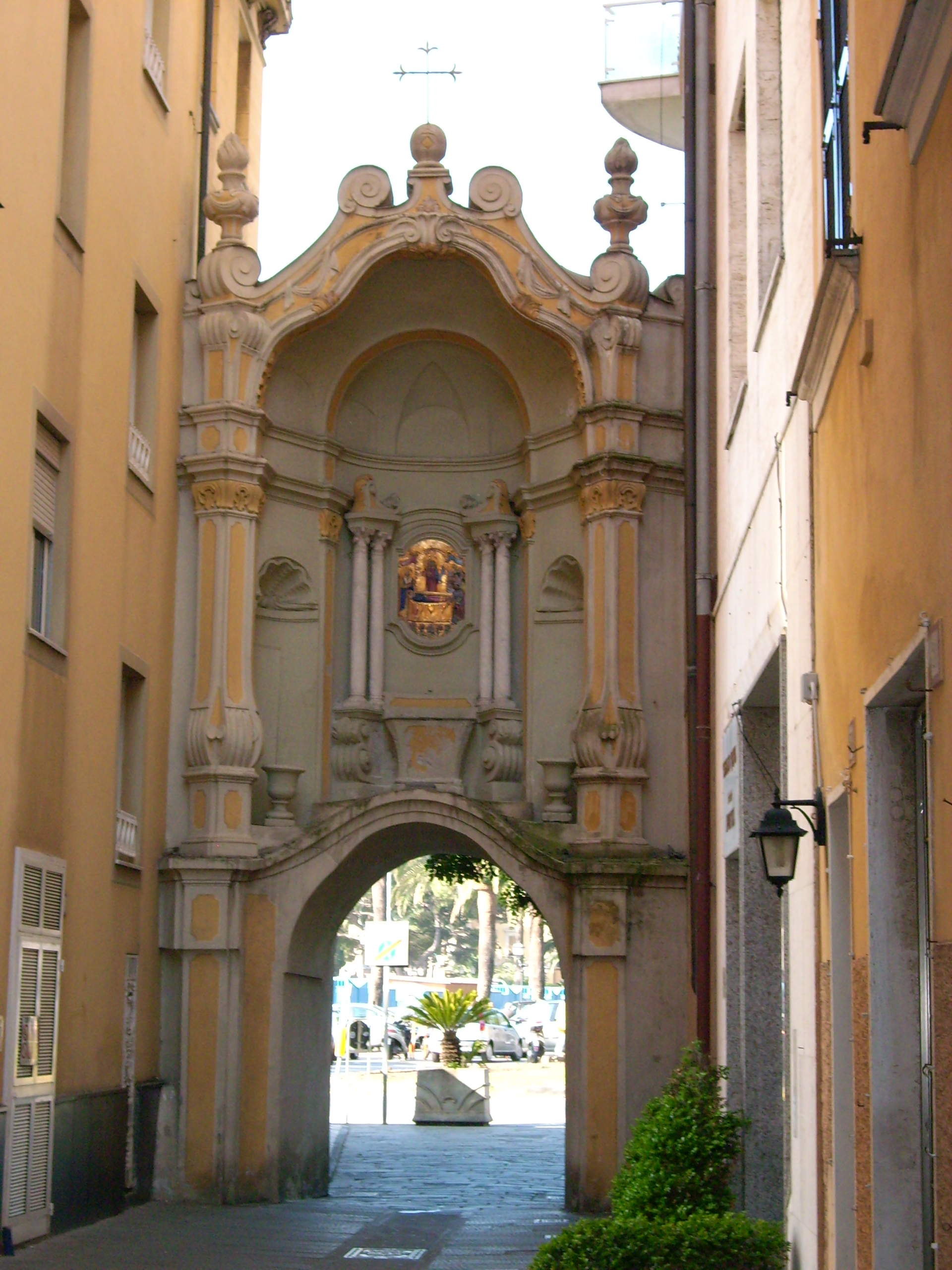 Porta delle Saline di Rapallo, Liguria, Italia